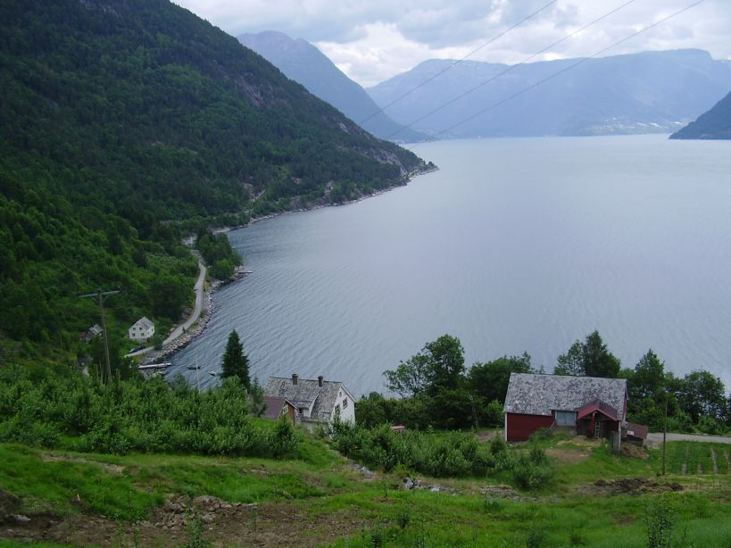 Utsikt frå Tjoflot inn mot Kinsarvik og Lofthus i Hardangerfjorden. I front deler fjorden seg i Sørfjorden og Eidfjorden.